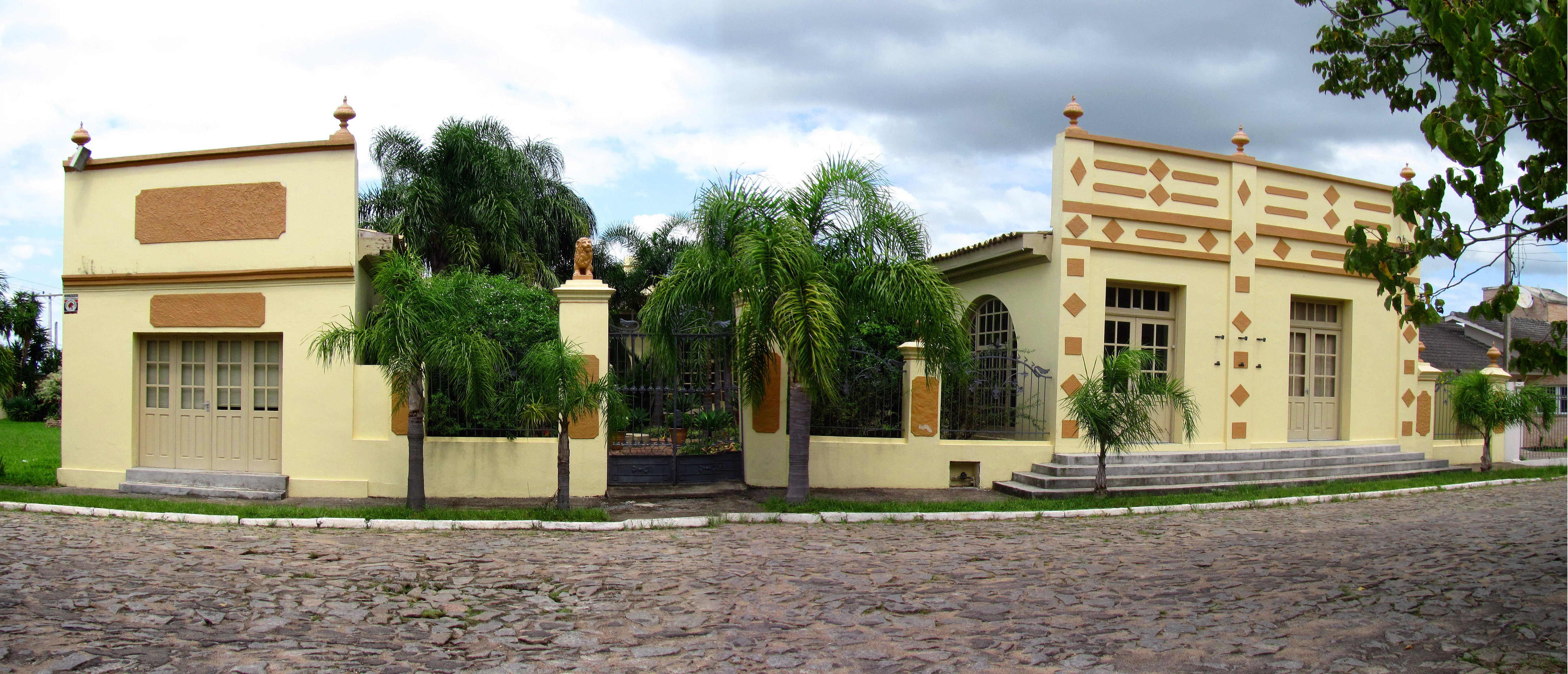 Forte Zeca Netto, Acervo Barbosa Lessa, Biblioteca Pública Oswaldo Lessa da Rosa e Museu Divino Alziro Beckel